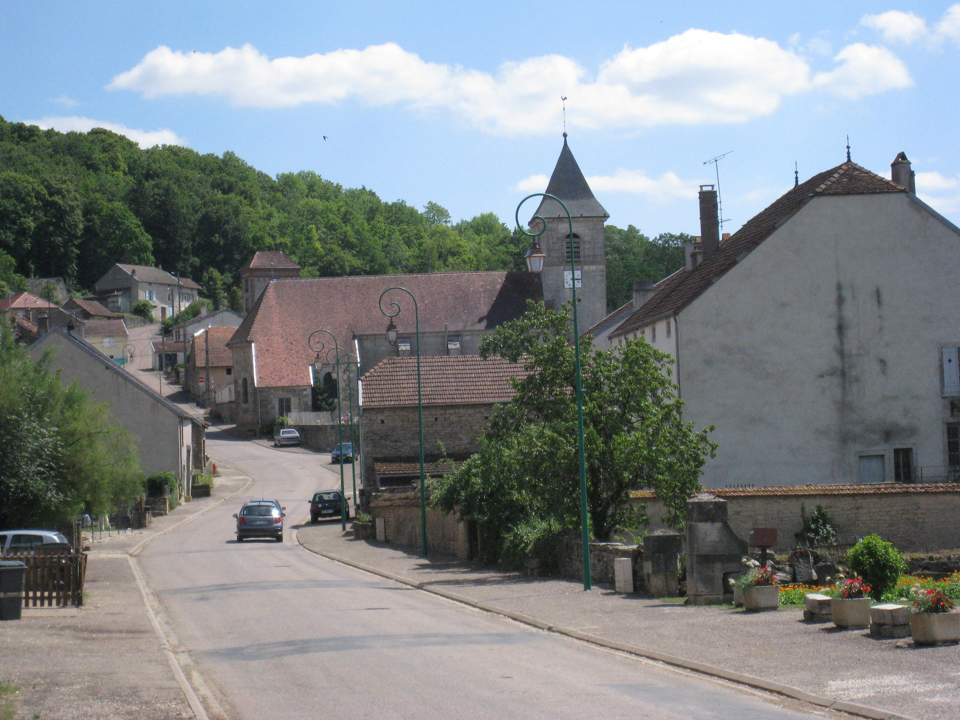 Le village de Grenant